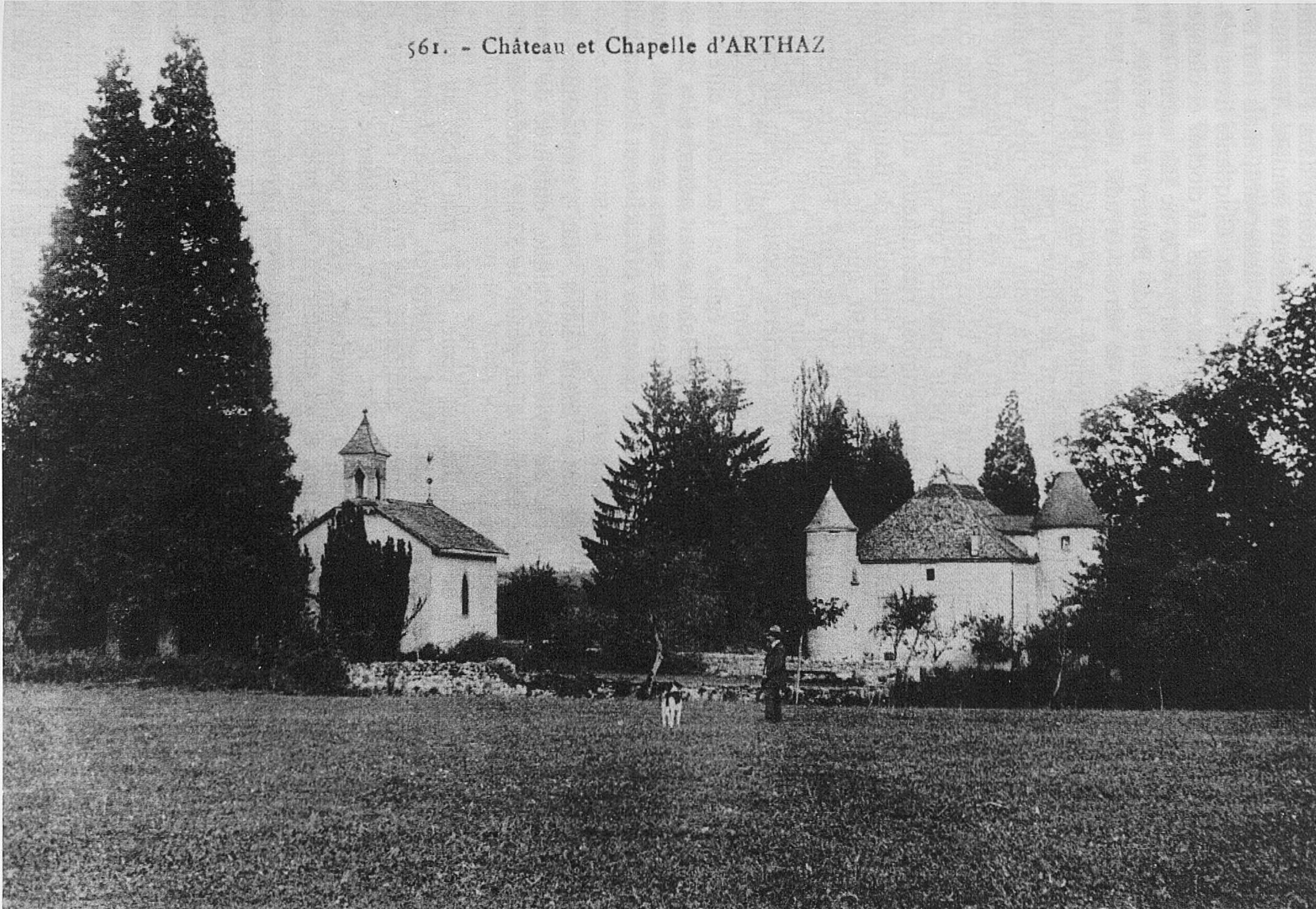 Photographie du château et de la chapelle d'Arthaz.